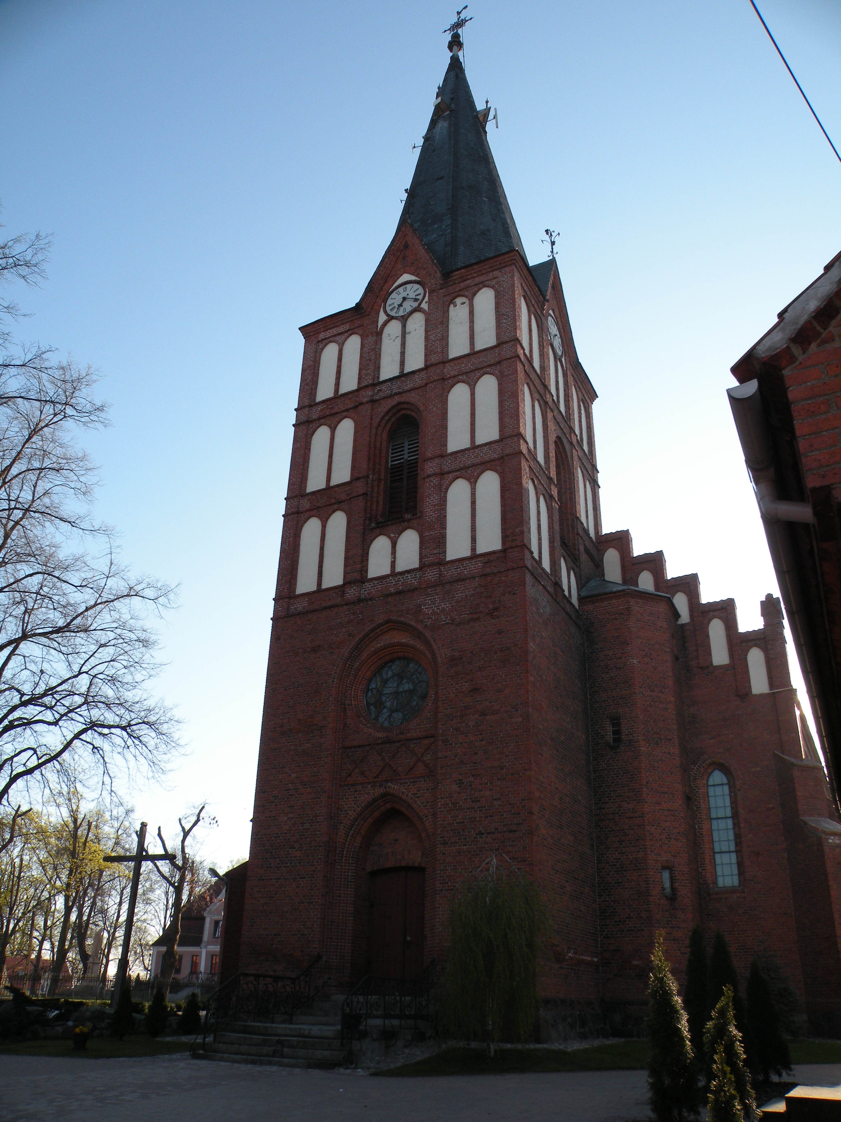 Kościół w Klebarku Wielkim, widok od wejścia głównego, sanktuarium Świętego Krzyża